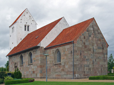 da. Stjær Kirke, Galten Kommune, Framlev Herred, Århus Amt, Denmark